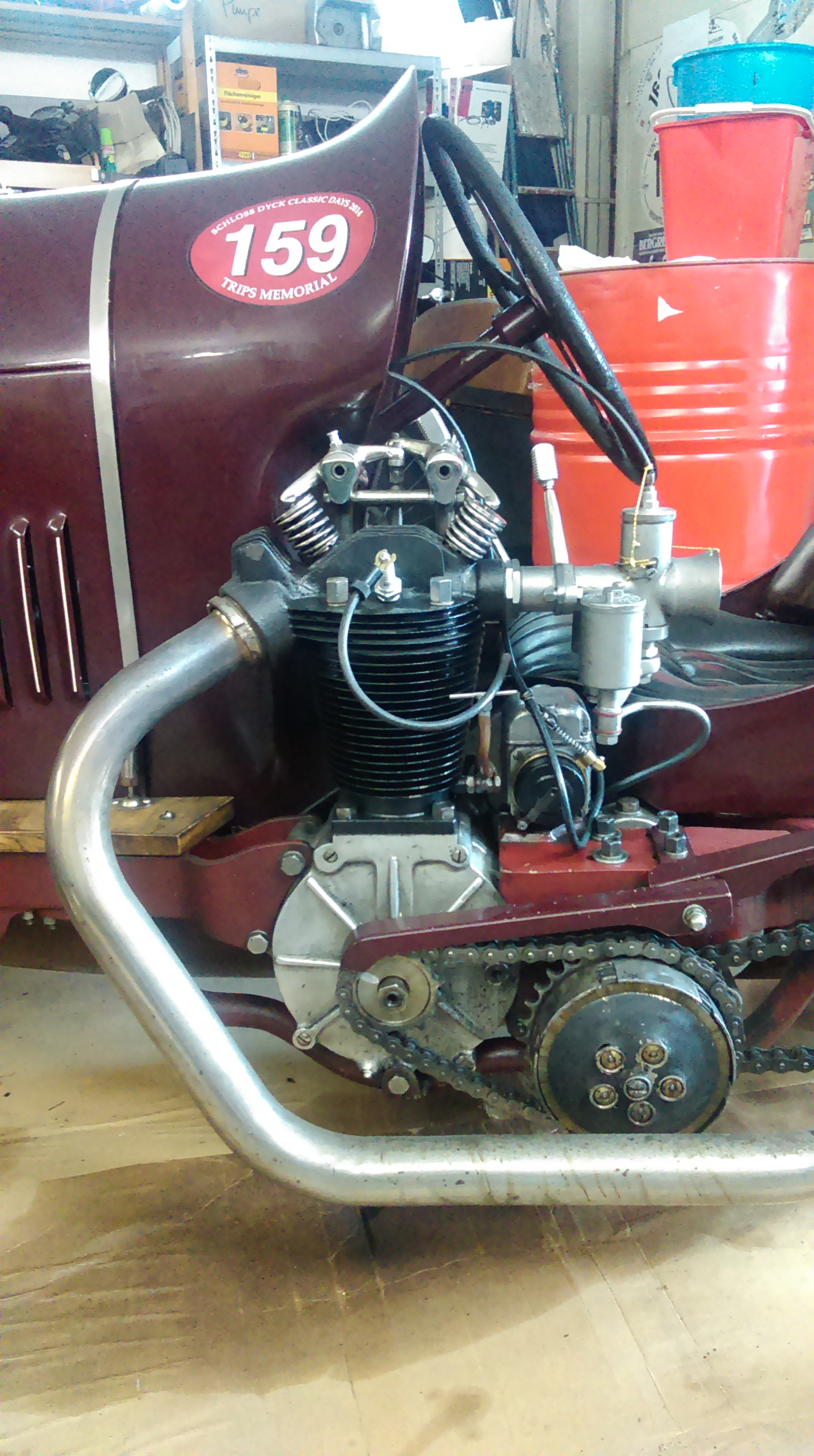 Sarolea 23U Rennmotor 500cc Bj. 1928 verbaut im Schasche Cyclecar